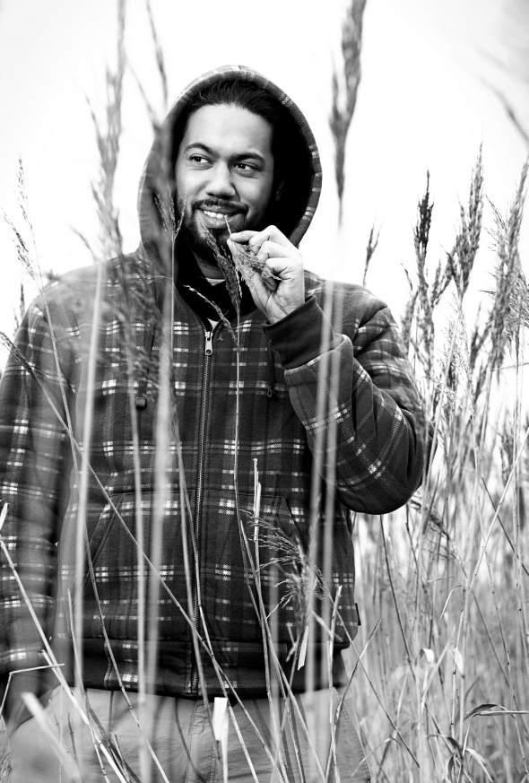 Pressefoto von Samy Deluxe zur Albumveröffentlichung „Dis wo ich herkomm“